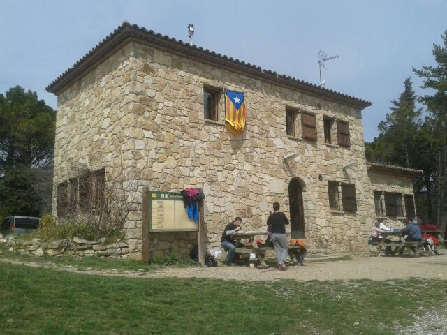 La Mussarako errefugioa